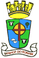 Brasão do Município de Senhor do Bonfim, Bahia, Brasil